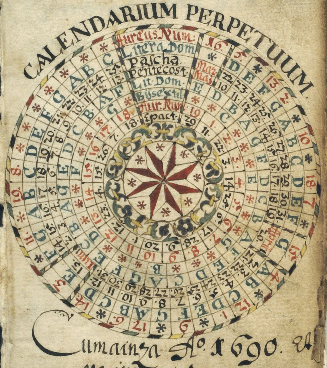 Ewiger Kalender (Julianisch) von 1690 aus Graubünden/CH (Annahme des Gregorianischen Kalenders erst im 18. Jh.)